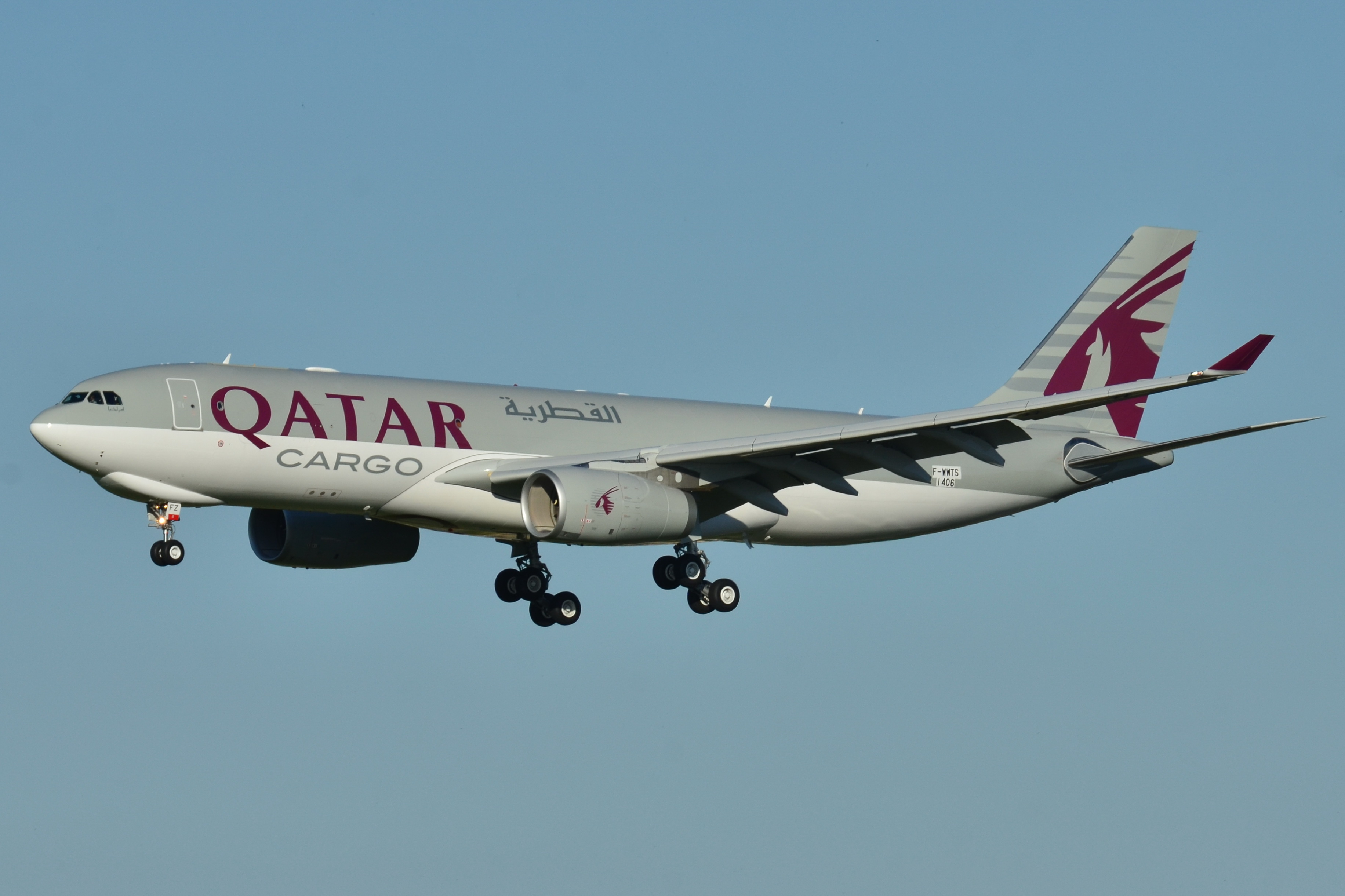 Photo prise à l'aéroport de Toulouse-Blagnac (LFBO) en France. Picture take at Toulouse-Blagnac Airport (LFBO) in France.